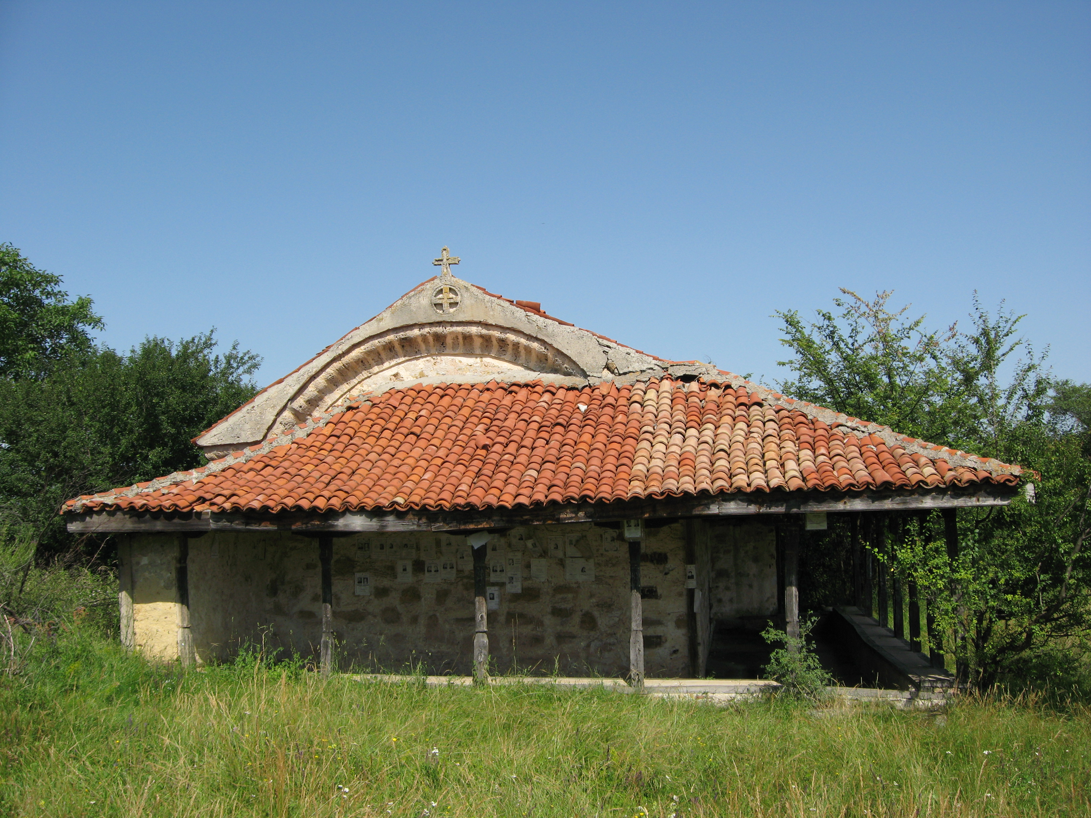 Църквата "Свети Илия", село Режанци